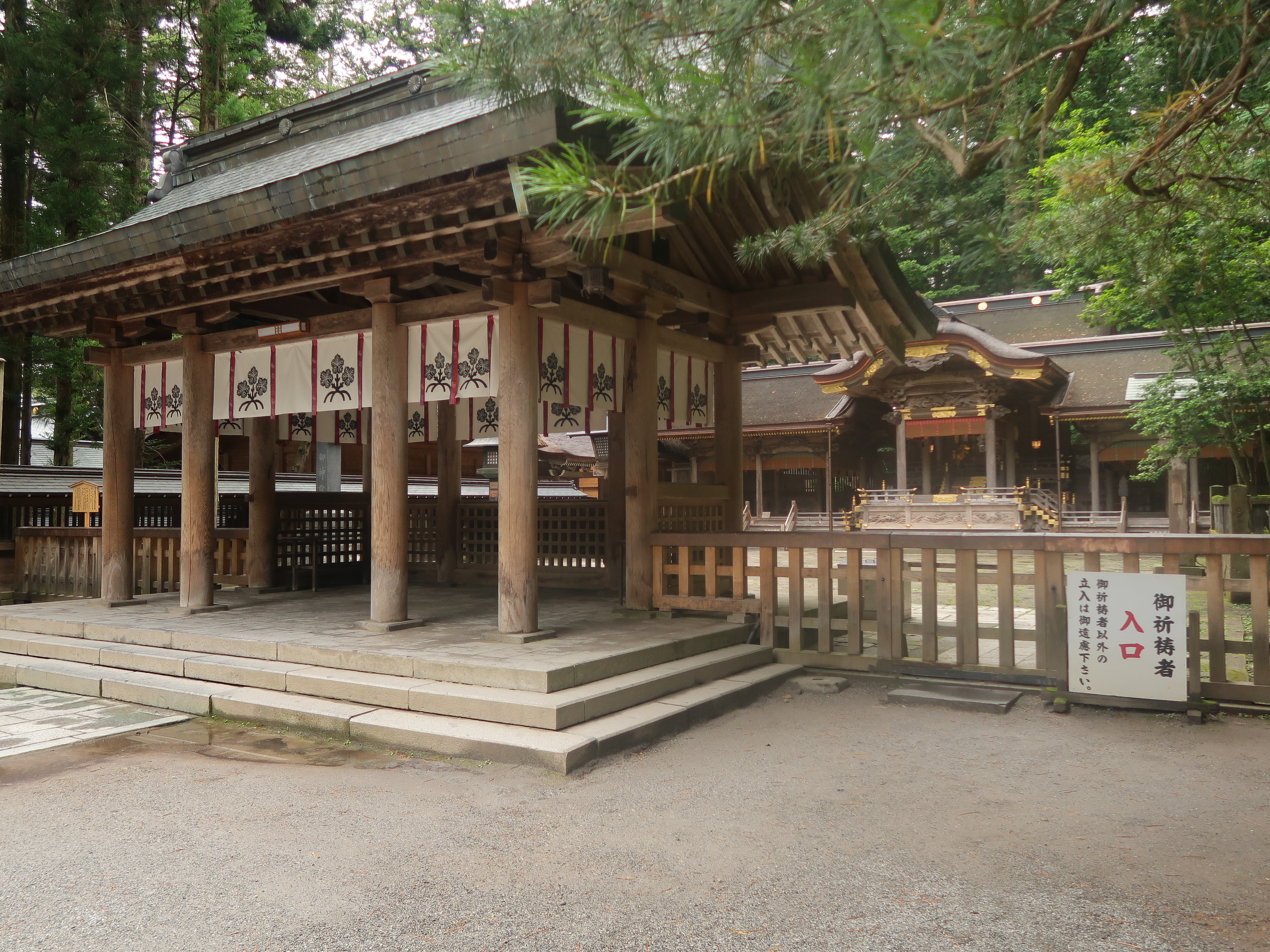 諏訪大社上社本宮 拝殿・拝所 Canon PowerShot G7 X Mark II